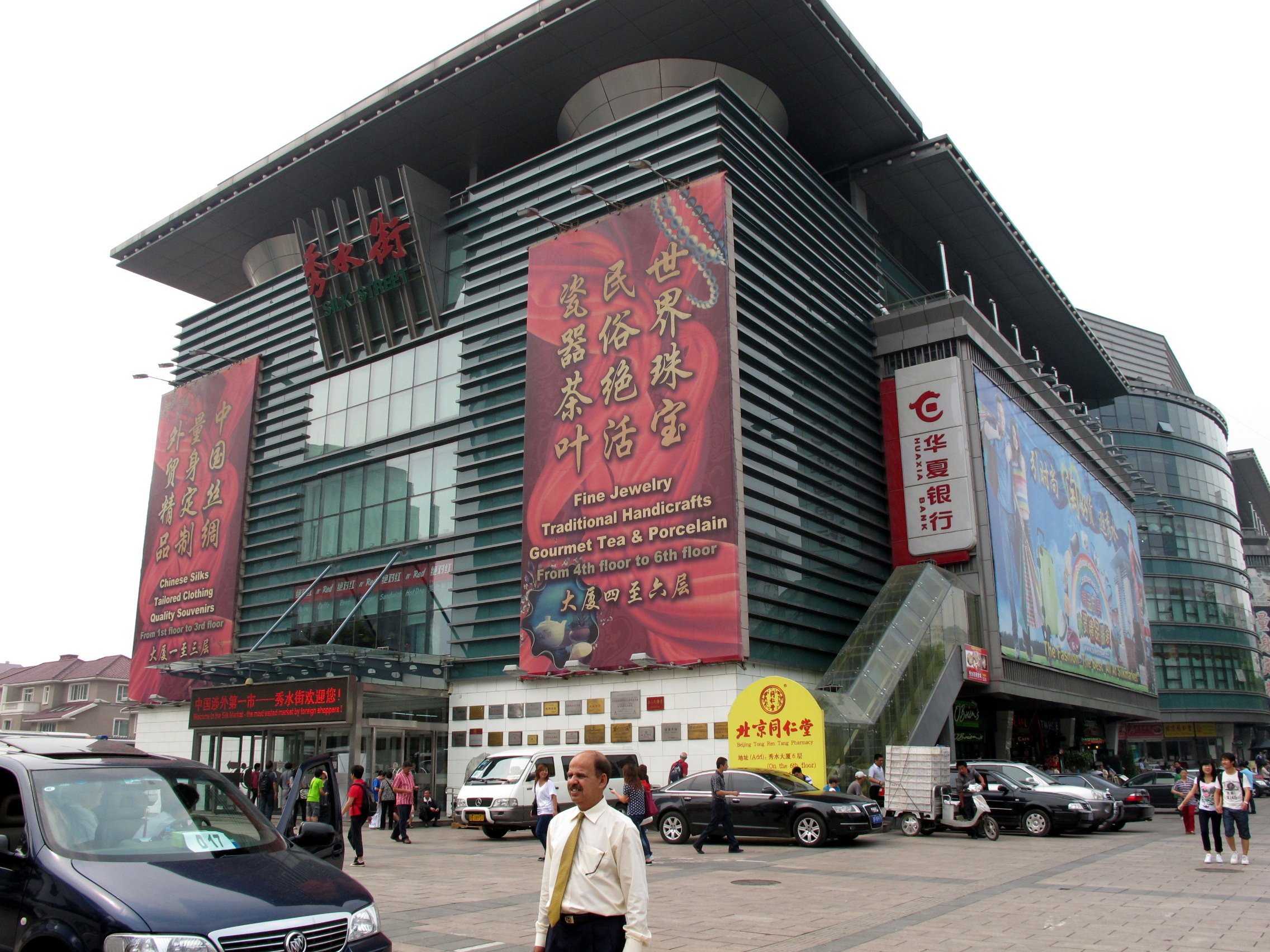 Beijing Silk Street Shopping Arcade 北京市 秀水街市場